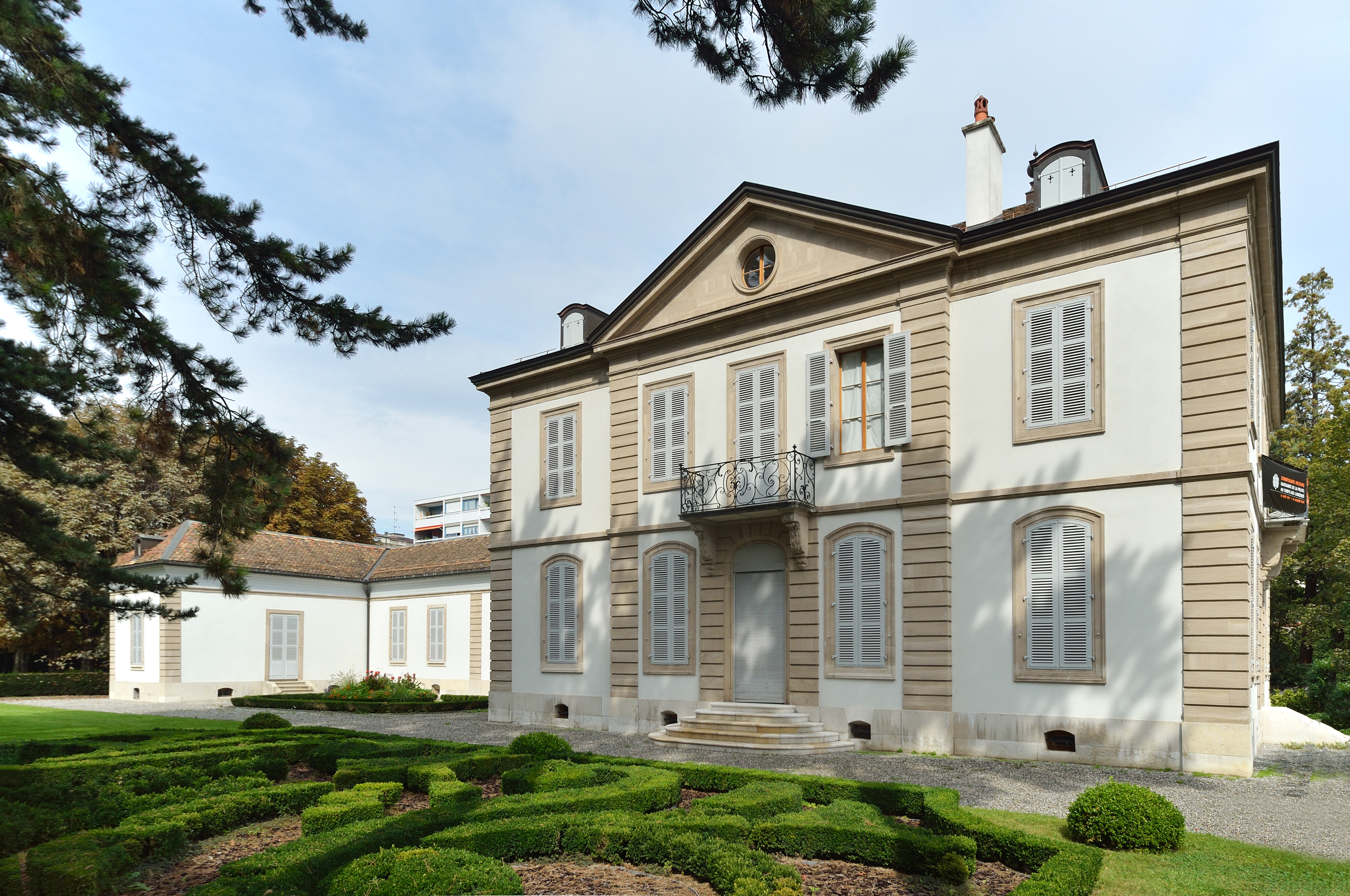 Institut et musée Voltaire (Genève, Suisse)